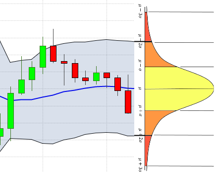 Vue mathématique des bandes de Bollinger avec des bandes sur 2 fois l'écart-type correspondant à une loi normale.